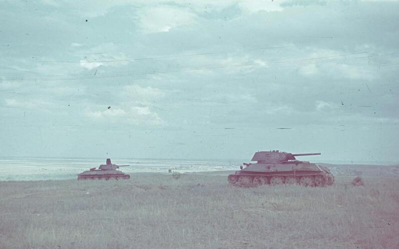 Abgeschossene sowjet. Panzer